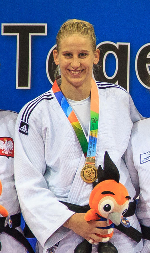 Anamari Velenšek. Foto: Sgt Johnson Barros